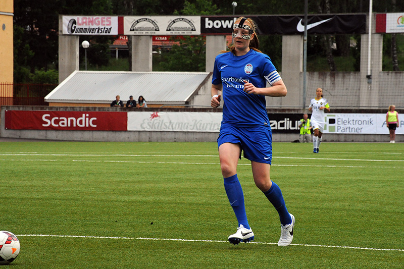 Vaila Barsley (Eskilstuna United DFF)